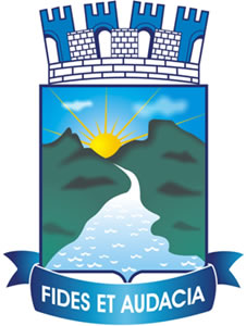 Brasão da cidade de Monteiro, Paraíba, Brasil